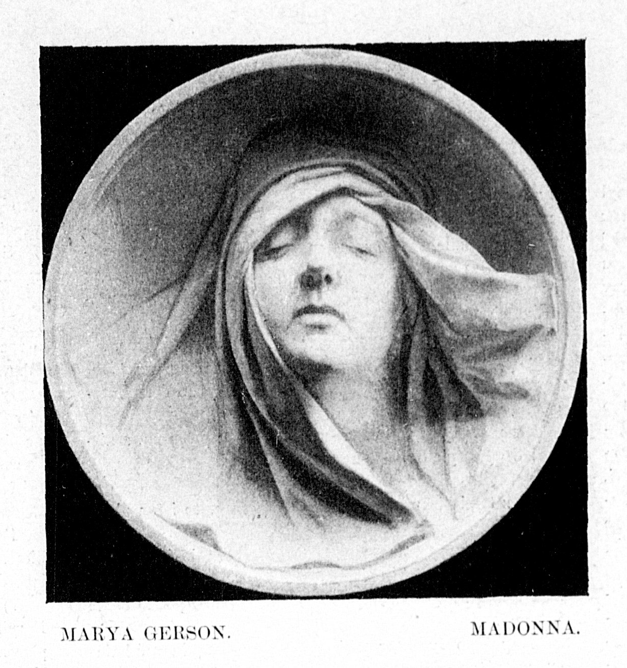 Reprodukcja opublikowana w: "Wędrowiec" 1900, nr 11, s. 212.